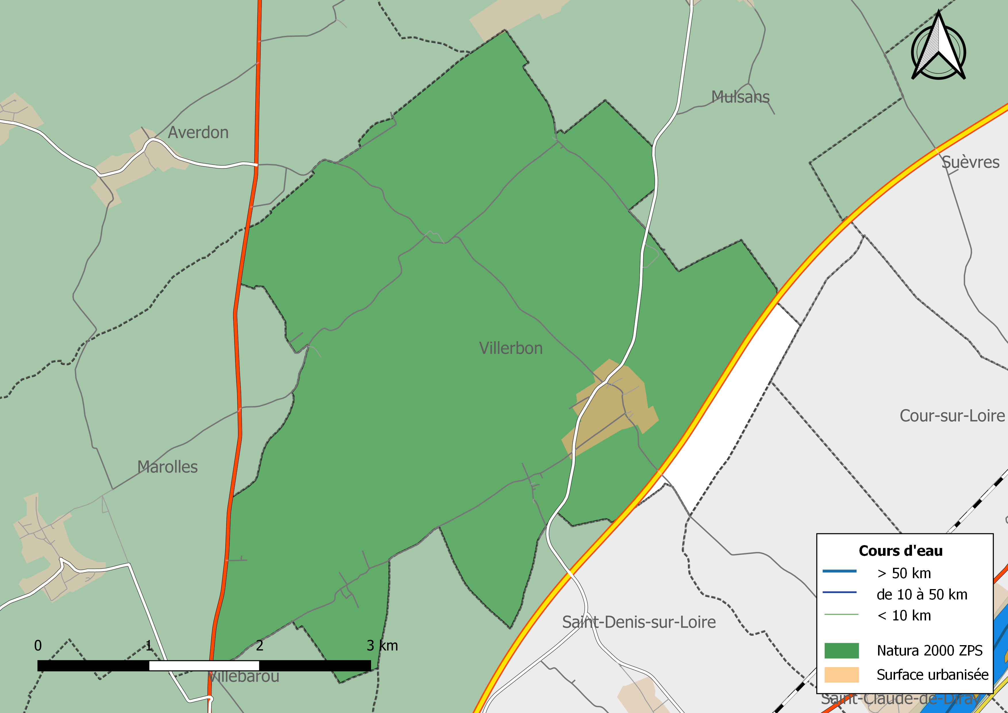 Carte du site Natura 2000 de type ZPS de la commune de Villerbon (France).